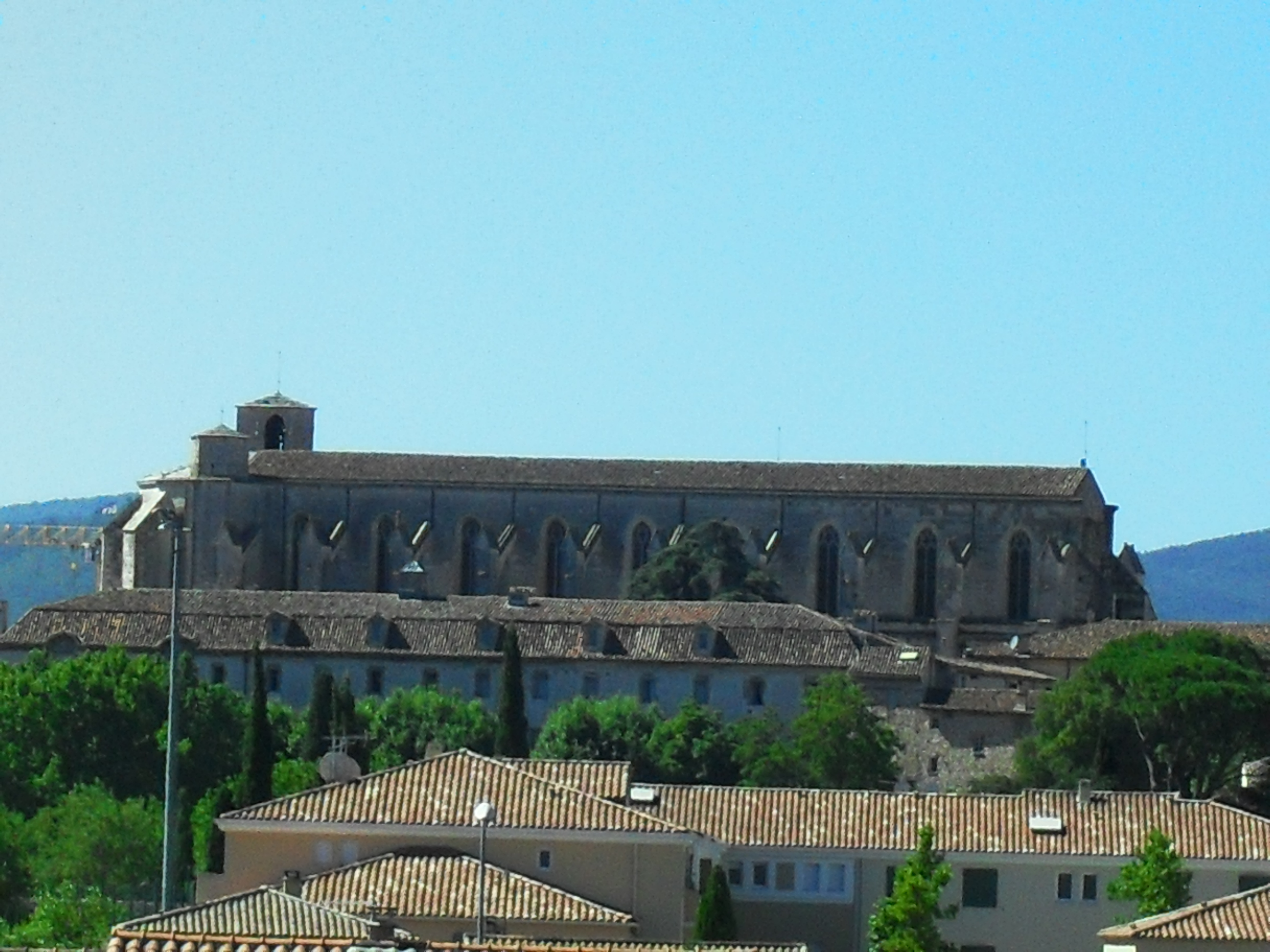 Basilique de saint Maximin vue depuis la sortie de l'autoroute A 7.